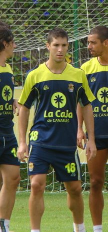 Álvaro Cejudo